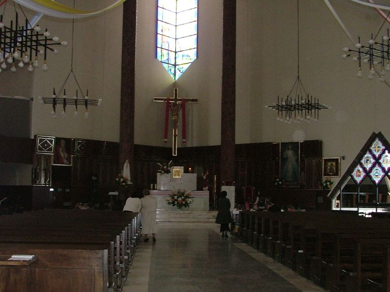 PL, Warsaw, Poland, Praga Południe, Grochów, ul. Kobielska 10, Kościół Nawrócenia św. Pawła Apostoła w Warszawie